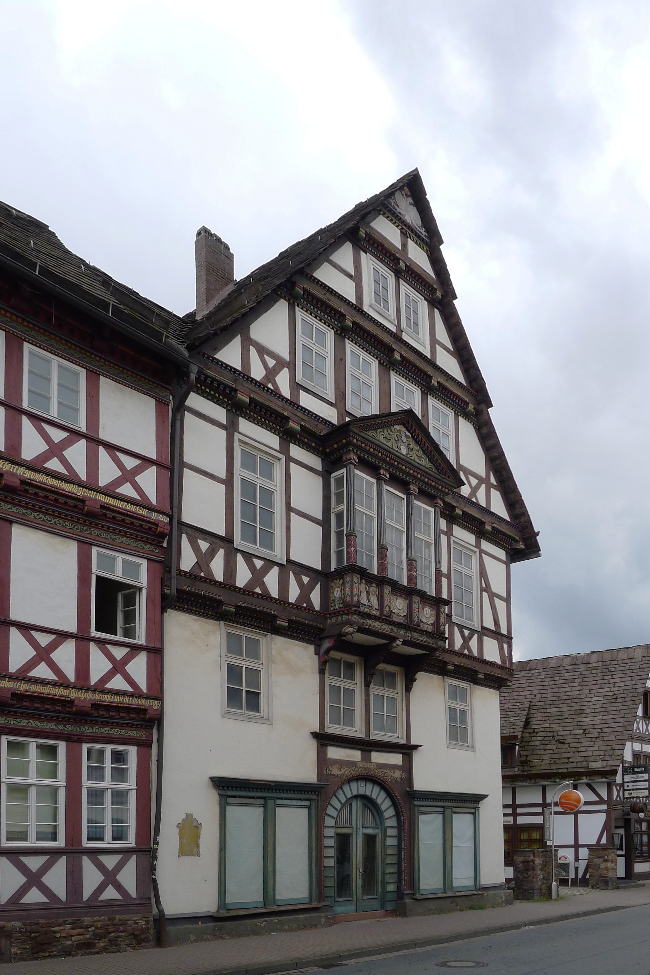 Bürgerhaus, erbaut 1582, Quartier des Feldmarschall Tilly